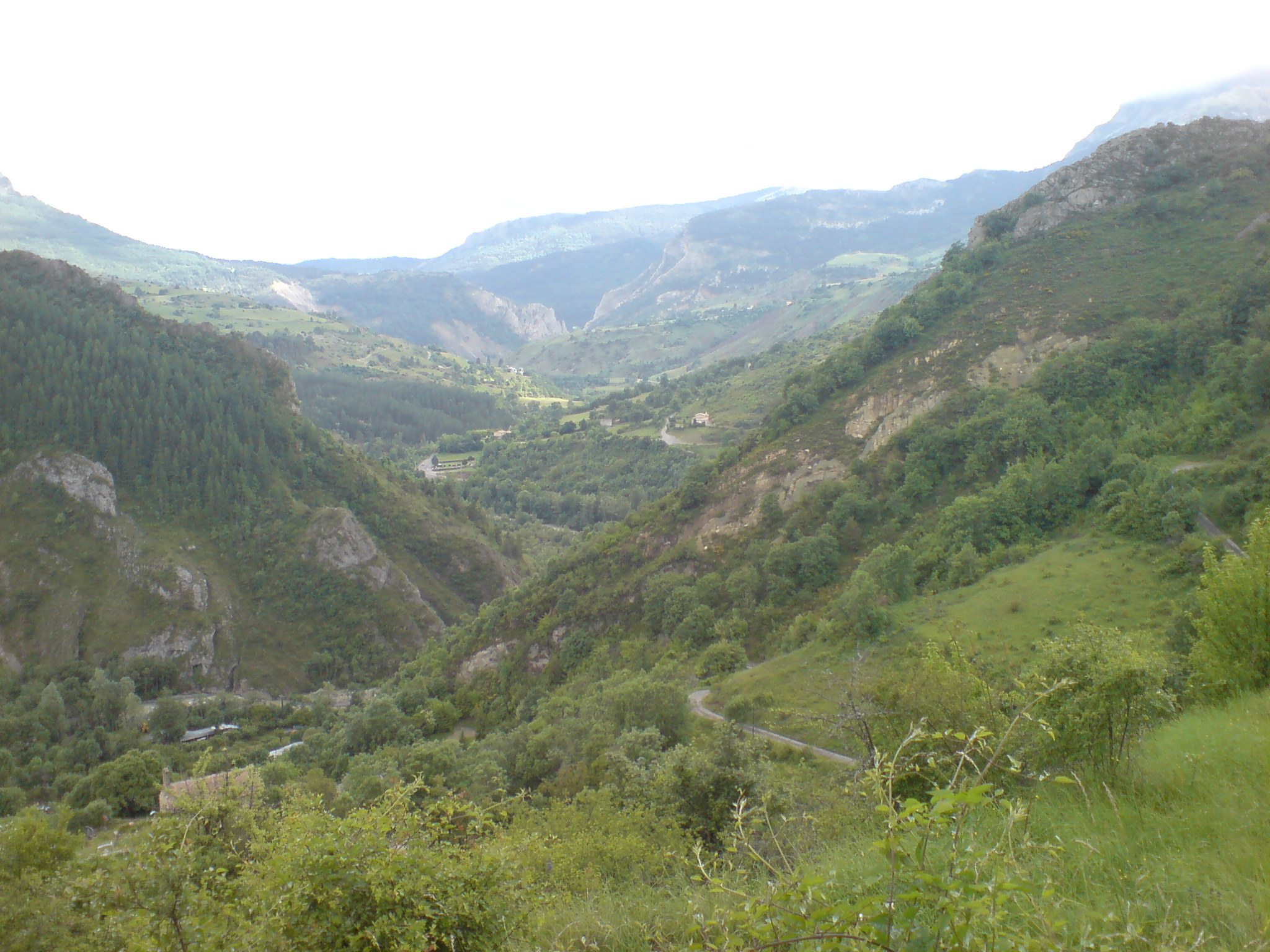 Vue de la vallée du Bès avec les Clues de Barles au fond.